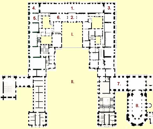 Versailles, Corps de Logis Grundriss 1. Obergeschoss / Plan du premier étage I. Marmorhof / Cour marbre II. Königshof / Cour royale 1. Spiegelgalerie / Galerie des Glaces 2. Königliches Schlafzimmer / Chambre du Roi 3. Kriegsalon / Salon de la guerre 4. Friedensalon / Salon de la paix 5. Schlafzimmer der Königin / Chambre de la Reine 6. Ochsenaugensaal / Salon de l'Oeil de boeuf 7. Herkulessaal / Salon d’Hercule 8. Schlosskapelle / Chapelle royale